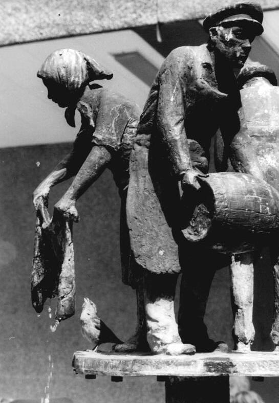 ADN-ZB-Junge-17.5.84-kb-Berlin: Zierbrunnen-Erfrischung bieten die zahlreichen Zierbrunnen der Hauptstadt. Im Innenhof der Rathauspassage steht das kleine Wasserspiel namens "Alt-Berlin". Die typischen Berliner Figuren mit ihren nässelnden Utensilien in den Händen schuf der Berliner Bildhauer Gerhard Thieme. (siehe auch 18N)"